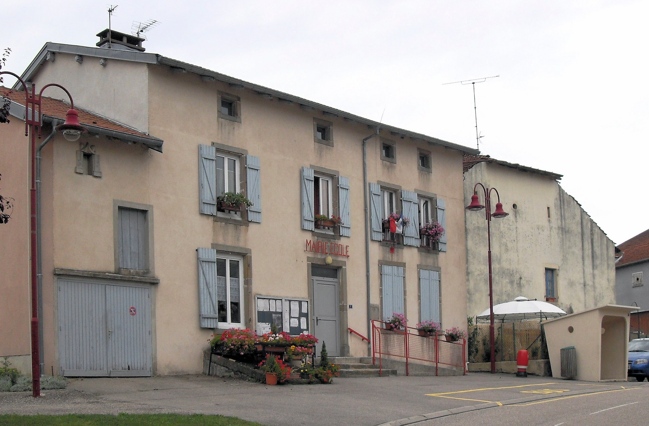 La mairie-école de Vroville